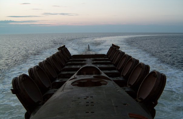 Ракетные шахты РПКСН К-433 проекта 667БДР "Кальмар".